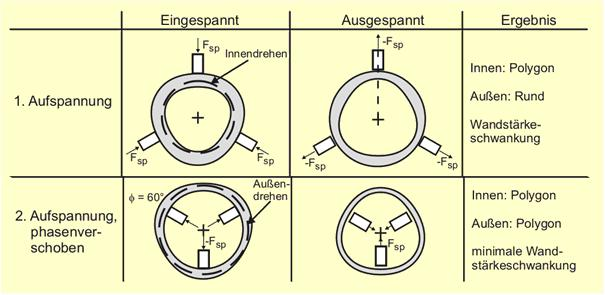 Schematische Darstellung einer Drehbearbeitung